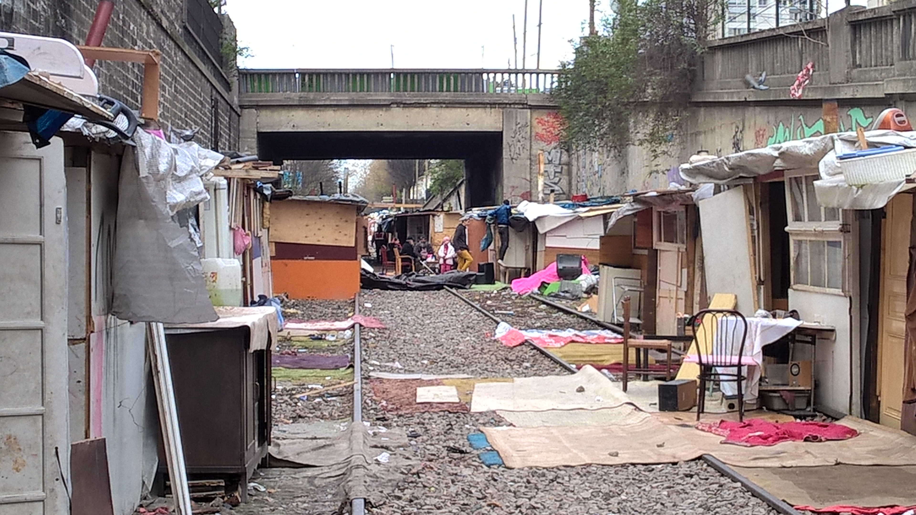 Bidonville en France, sous le Pont des Poissonniers, Paris 18, mars 2017